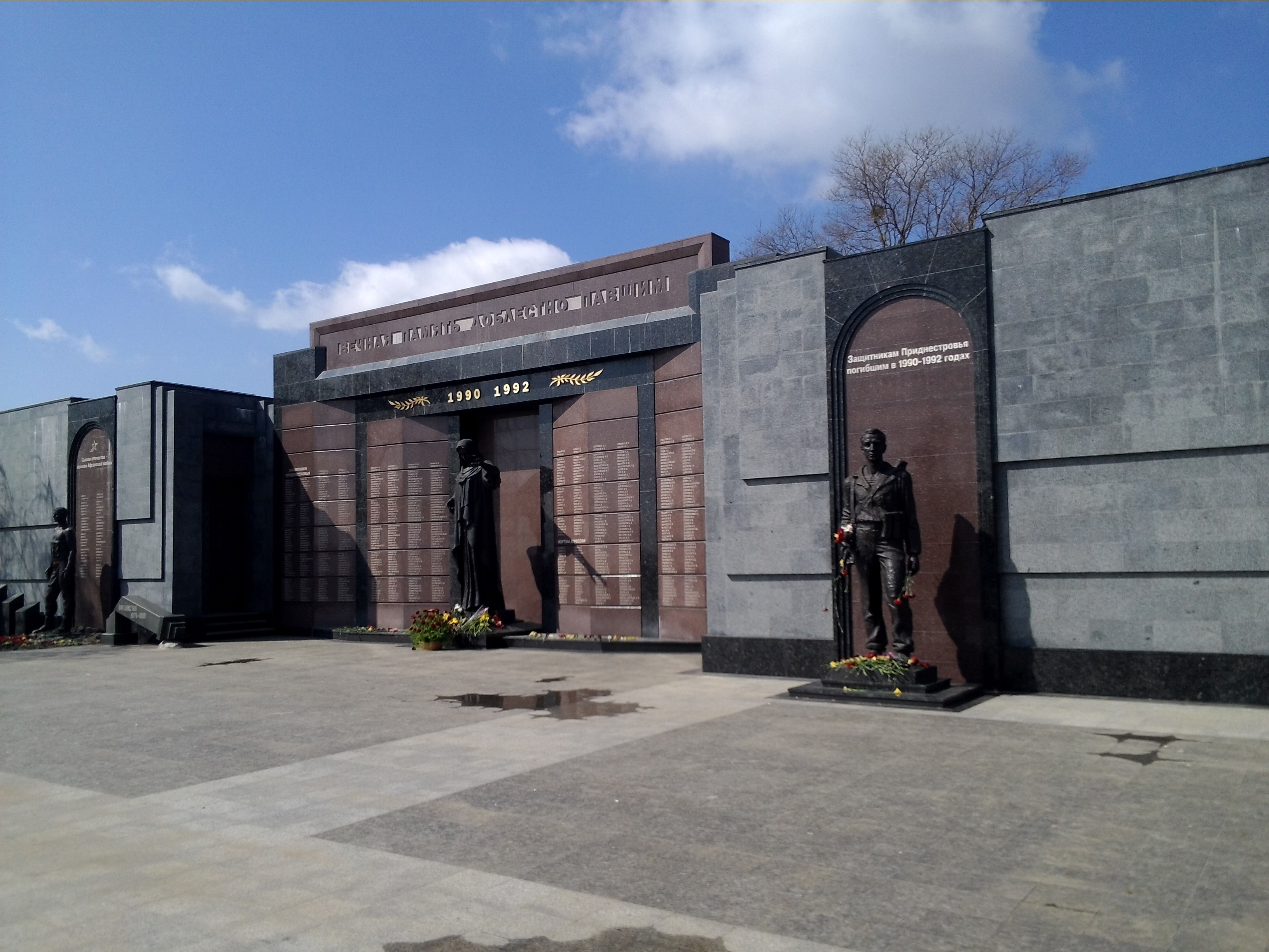 м. Тирасполь. Військовий меморіал (Велика Вітчизняна війна, Війна в Афганістані, Придністровський конфлікт)